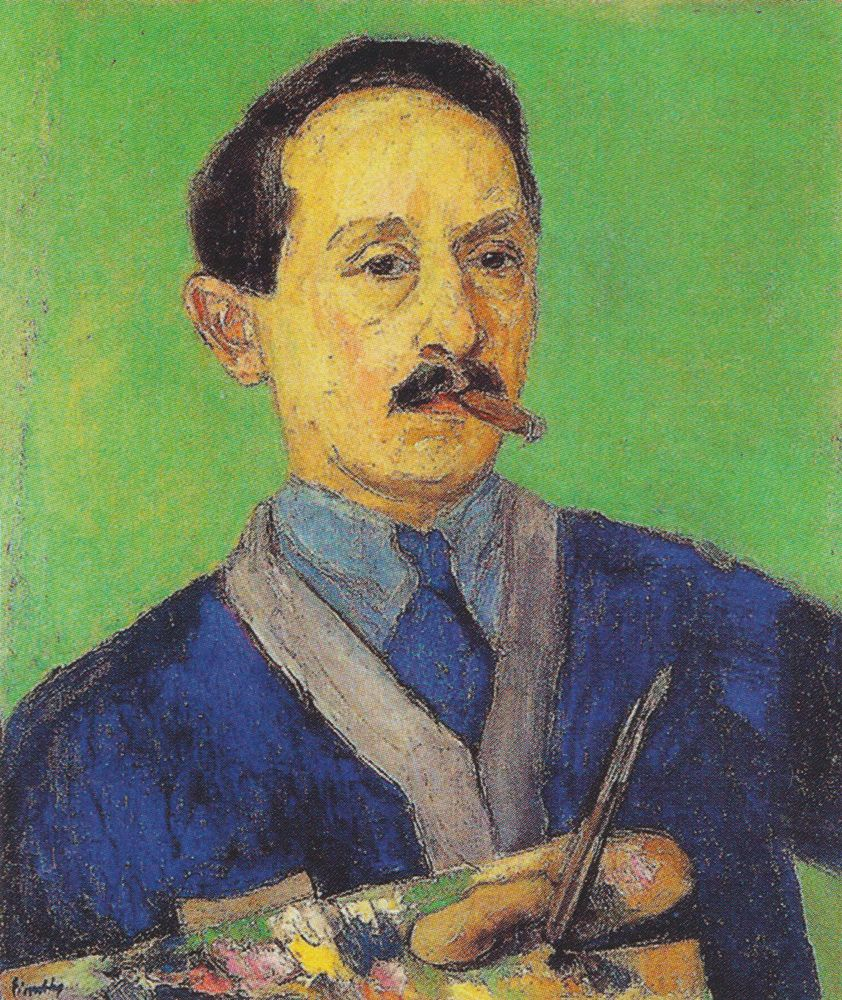 Selbstbildnis Eduard Einschlag, Öl auf Leinwand